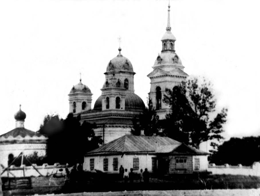 Ростовская область Куйбышево Церковь Николая чудотворца